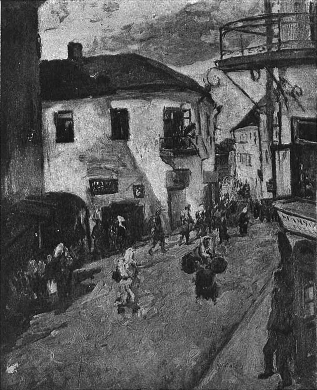 Беларуская (тарашкевіца): Менск (Miensk), Цёмныя Крамы (Ciomnyja Kramy), вуліца Казьмадзям'янаўская (vulica Kaźmadziamjanaŭskaja)